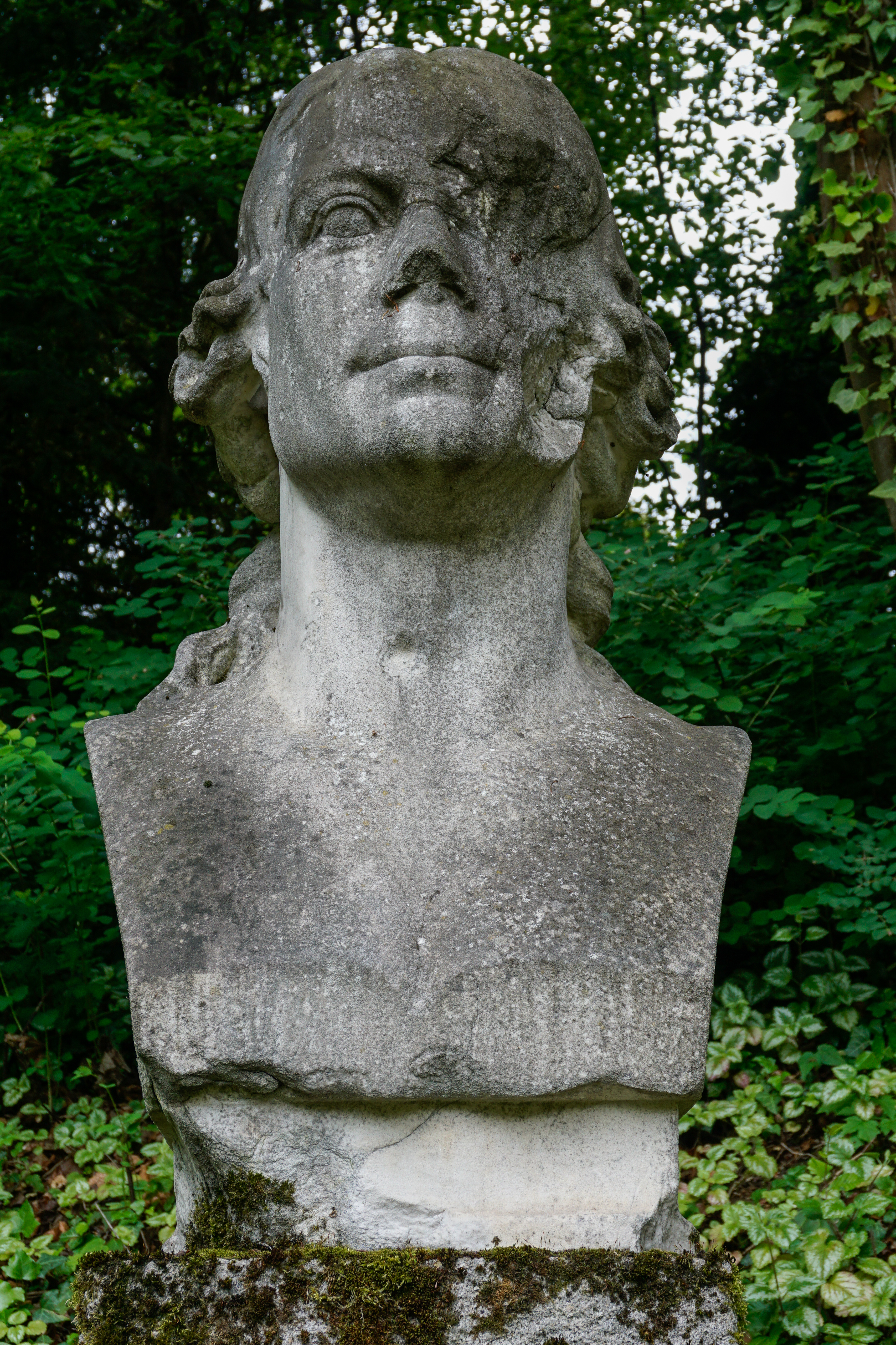 Städtisches Lapidarium Stuttgart, Inventarnummer 177, Büste von Johann Heinrich Dannecker, Marmor, 1888, Ernst Curfeß (1849-1896), Neues Schloss, Rosengarten